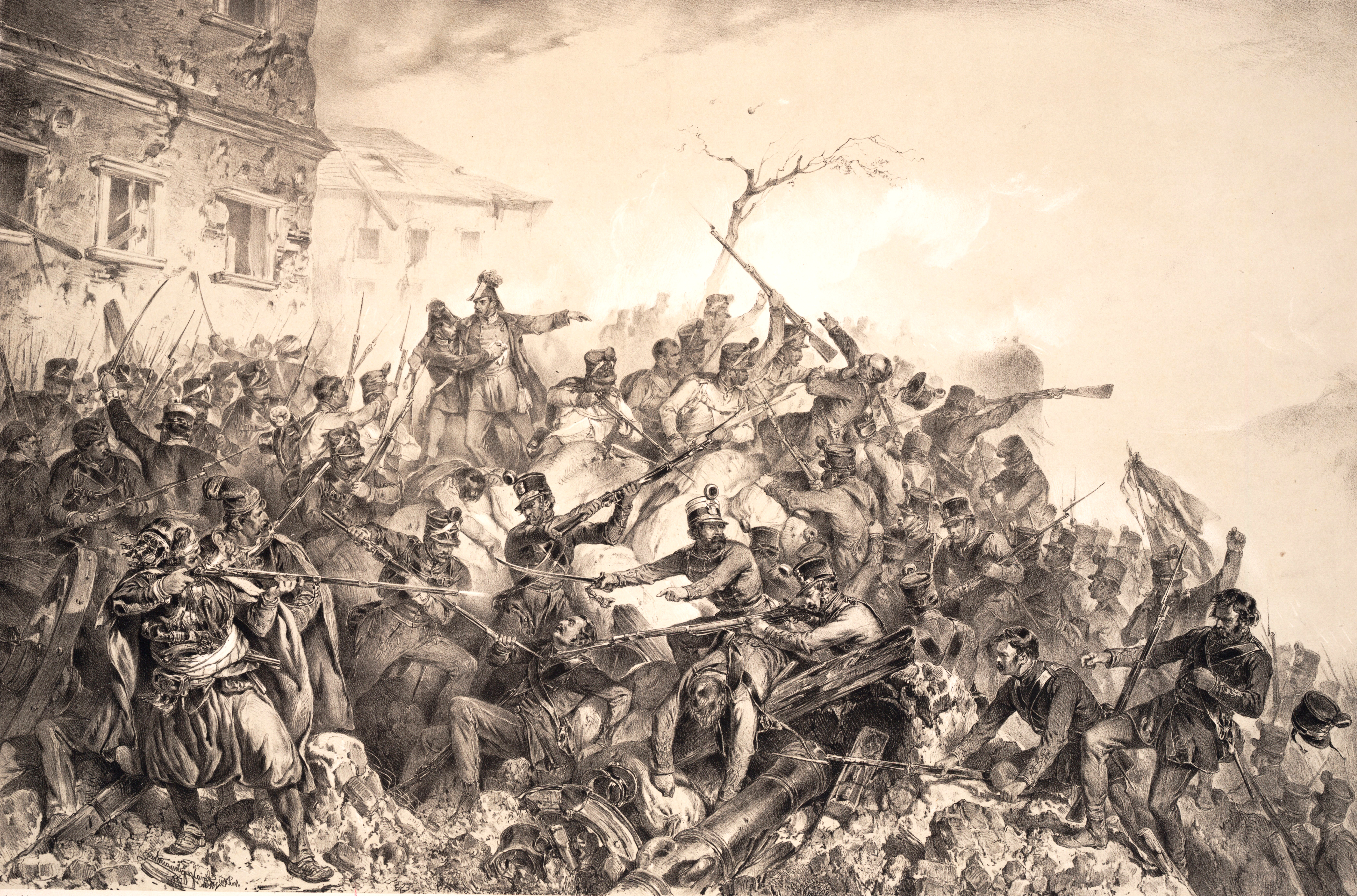 Heinrich Hentzi von Arthurm (Debrecen, 1785. október 24. – Buda, 1849. május 21.) császári és királyi vezérőrnagy megsebesülése és halála Buda ostromakor. "1849 május 20-ának éjjelén megkezdte Görgey a döntő támadást, mégpedig több ponton: így a Teleki-háznál, a fehérvári és bécsi kapunál és a Nádor-kertben. Hajnal volt, amikor Inkey, a 47. zászlóalj őrnagya, elsőnek hágott föl a bástyafalra. Nemsokára egészen a magyarok kezében volt a Vár, és minden oldalról vörös zsinóros, barna atillás honvédek nyomultak elő. A 47. zászlóalj kapitánya, Hertelendy Kálmán lőtte meg Hentzit, és a zászlóalj egyik honvéde." Vay Sándor gróf: 'Régi nemes urak', 1909